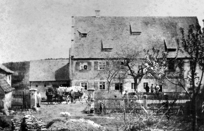 Königsmühle mit dem 1743 errichteten zweigeschossigen Wohnhaus aus Sandstein an der Gründlach im Erlanger Stadtteil Eltersdorf.